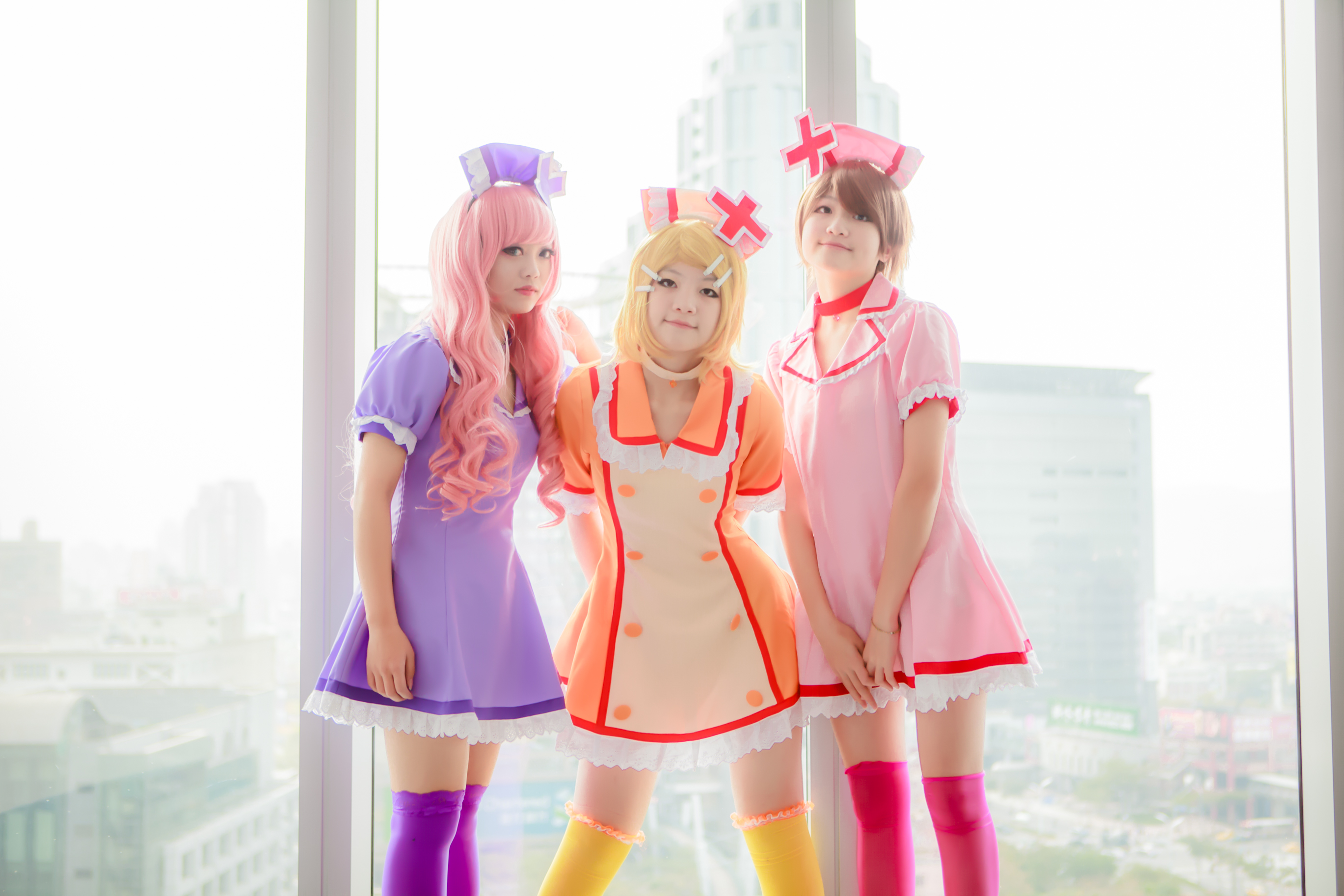 2014.01.20 戀色病棟巡音 鈴 大姊 CN 婉楓 小艾&妹妹 004 2014.01.20 戀色病棟巡音 鈴 大姊 CN 婉楓 小艾&妹妹